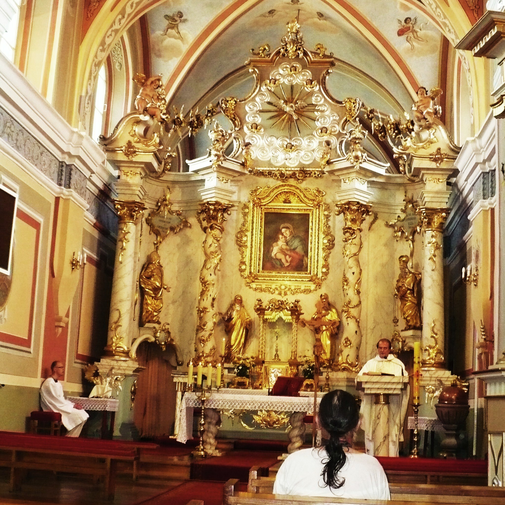 zespół klasztorny bernardynów, XVII-XX: kościół, ob. p.w. Niepokalanego Poczęcia NMP Świecie